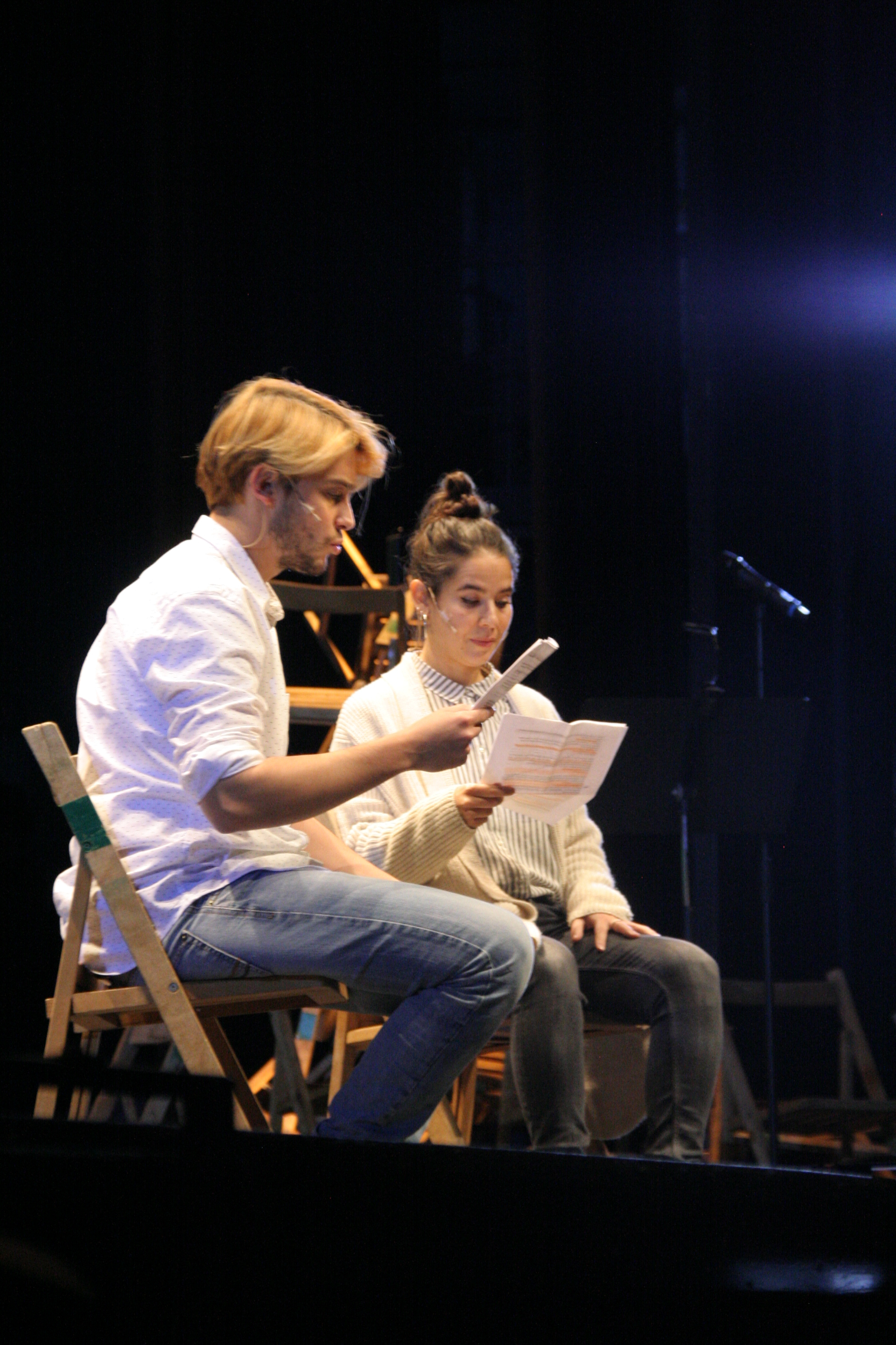 Al capdavall som bàrbars. Homenatge a Joan Oliver realitzat el 30 de novembre de 2016 al Teatre de la Faràndula de Sabadell.